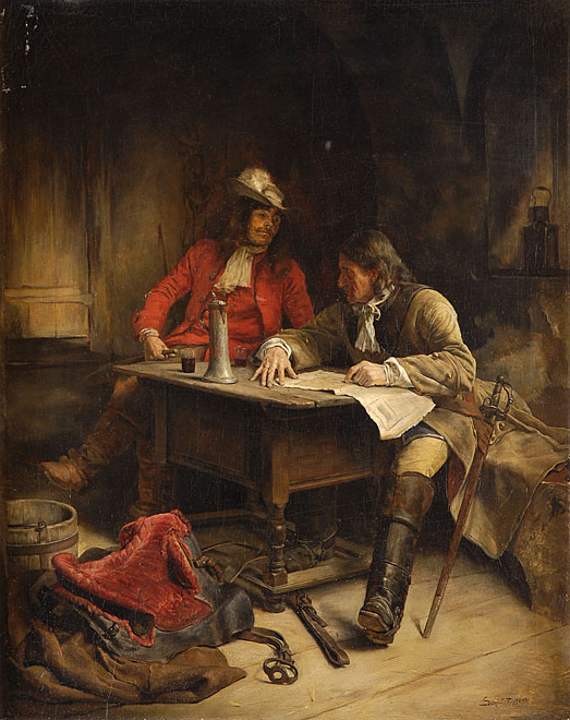 Alfred von Schrötter (1856–1935): Die Routenplanung. Signiert. Datiert 1884. Öl/Holz, 37 x 36 cm